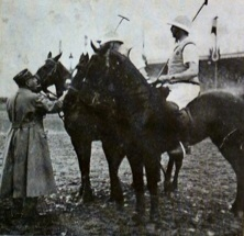 Vittel 1926, l'équipe du 10e Dragons composée du capitaine Abrial et des lieutenants Bezard-Falgas et Rollin est championne de France militaire de Polo